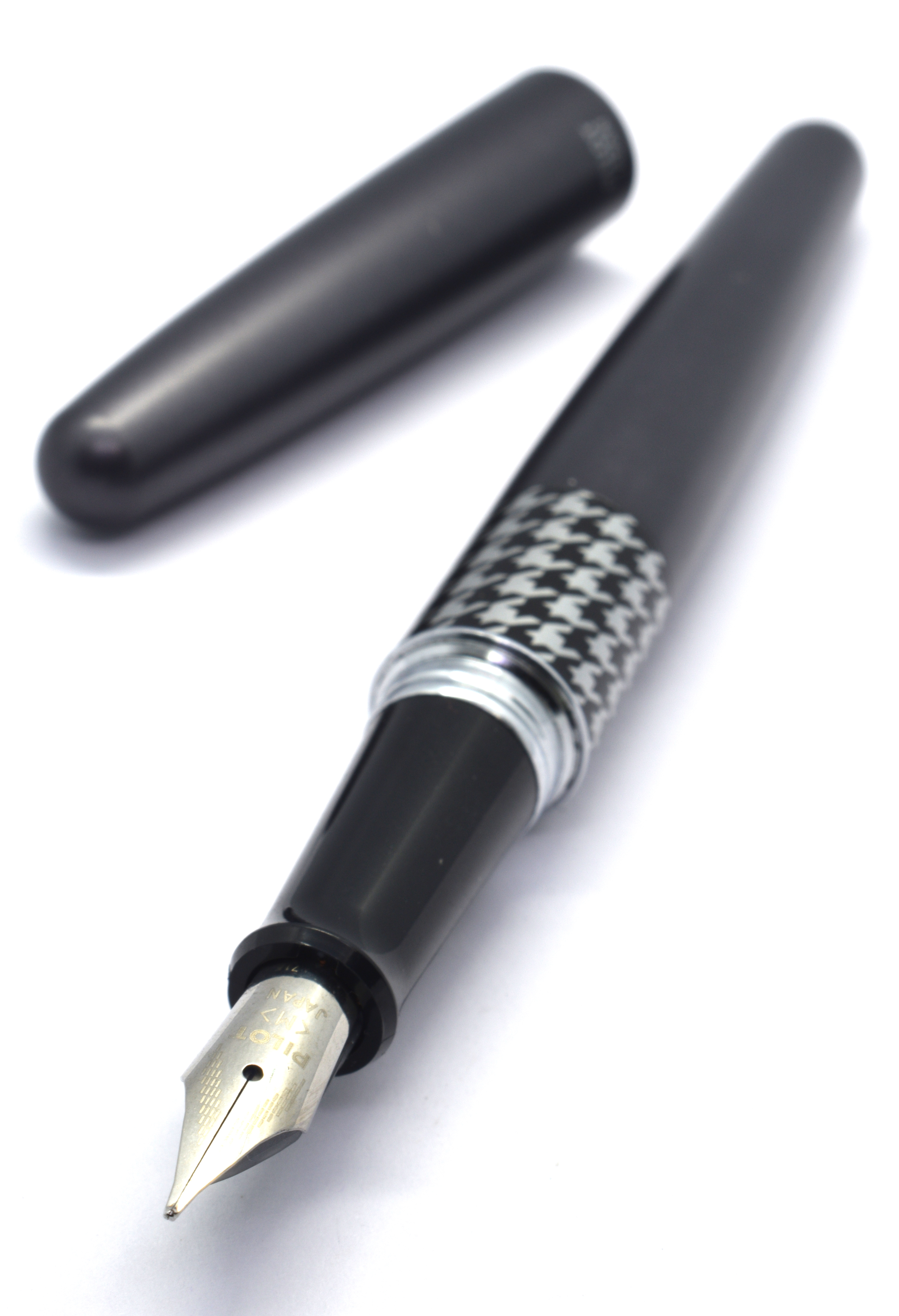 Pilot Urban MR Retro Pop M